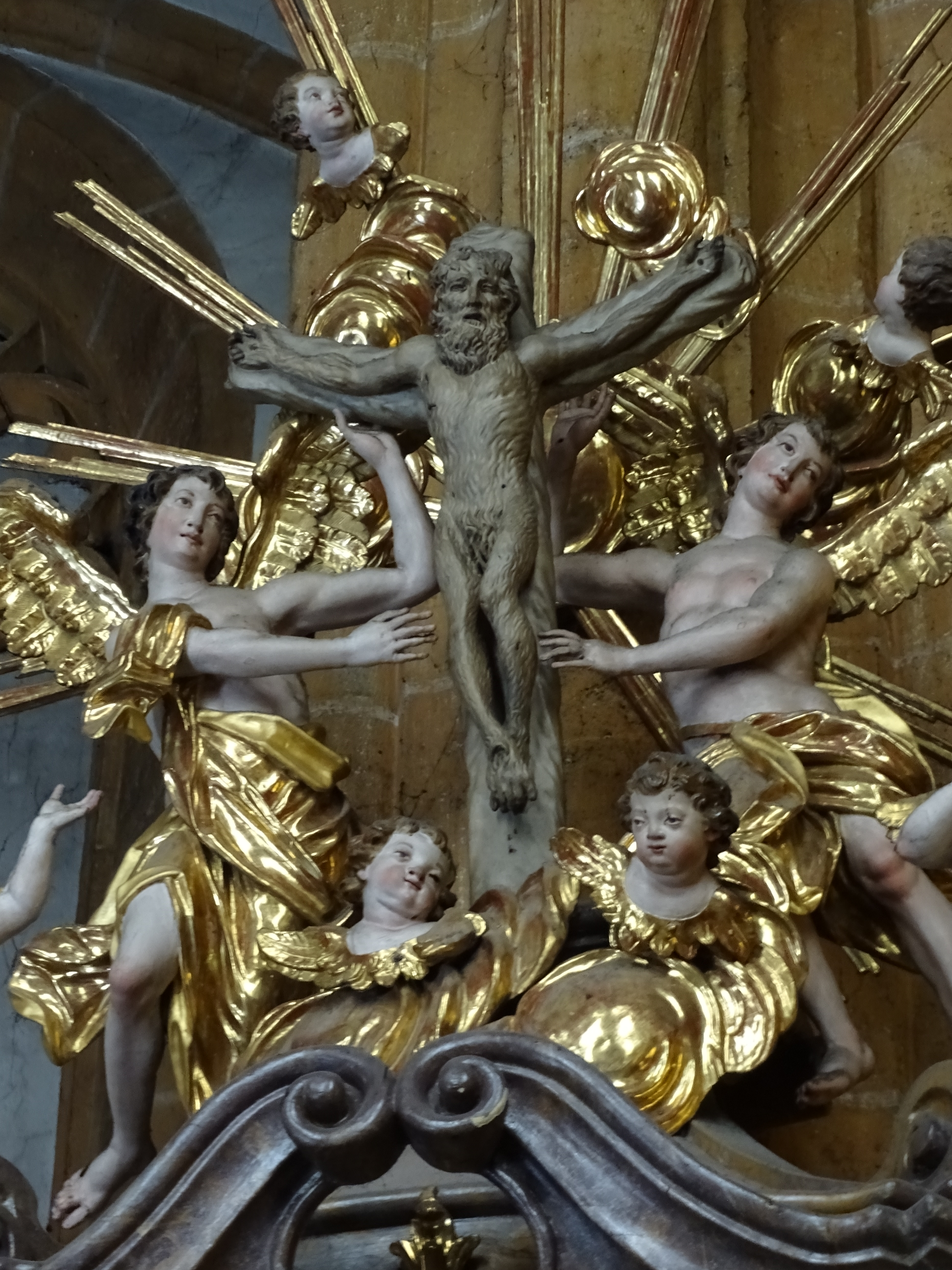 Eine plastische Darstellung des Wurzelkreuzes auf dem Schalldeckel der Kanzel in der Wallfahrtskirche Maria Straßengel